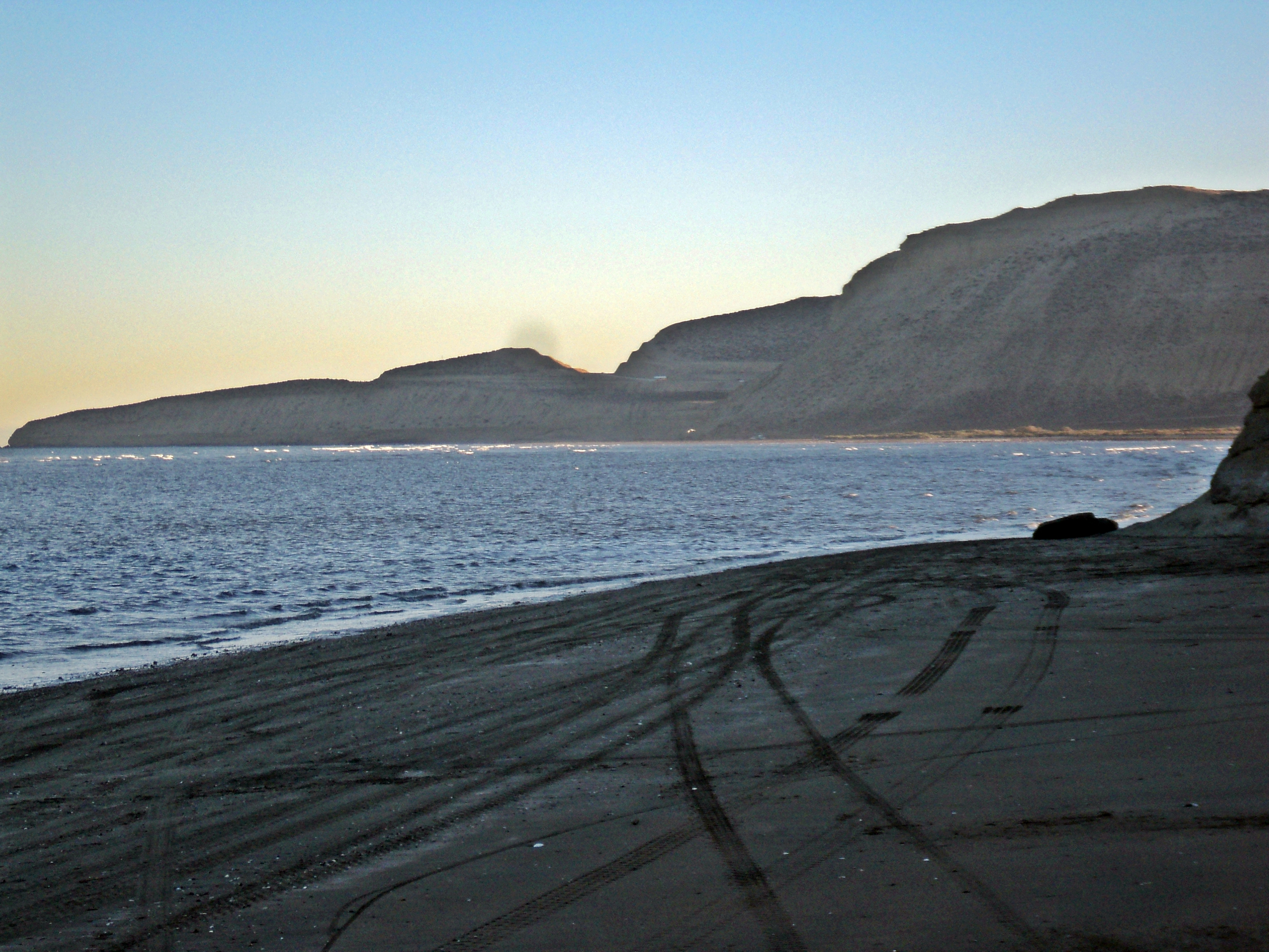 Punta Peligro mutilada por la autovía dela Ruta 3